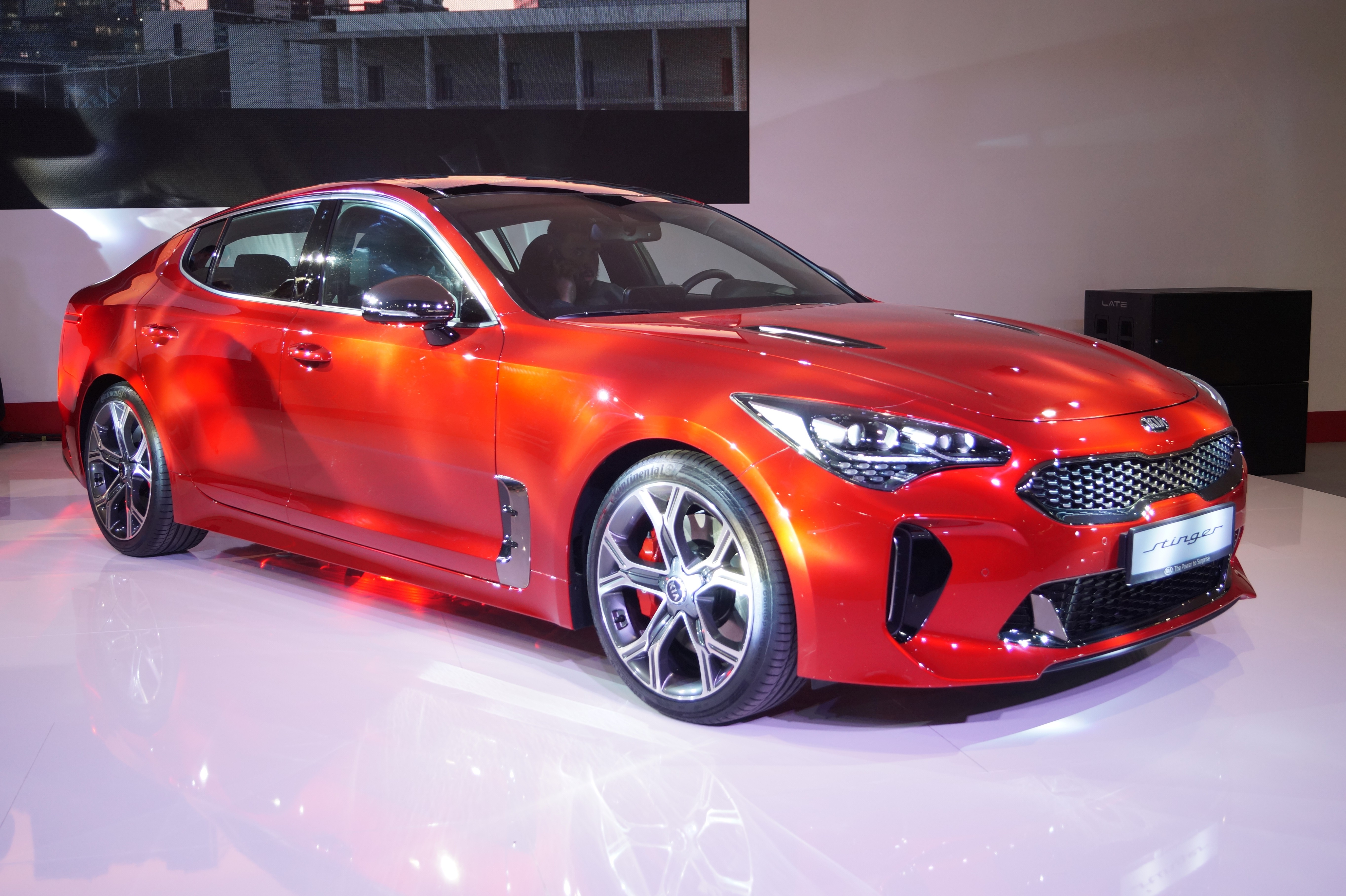 Prawy przód Kii Stinger na Motor Show Poznań 2017.